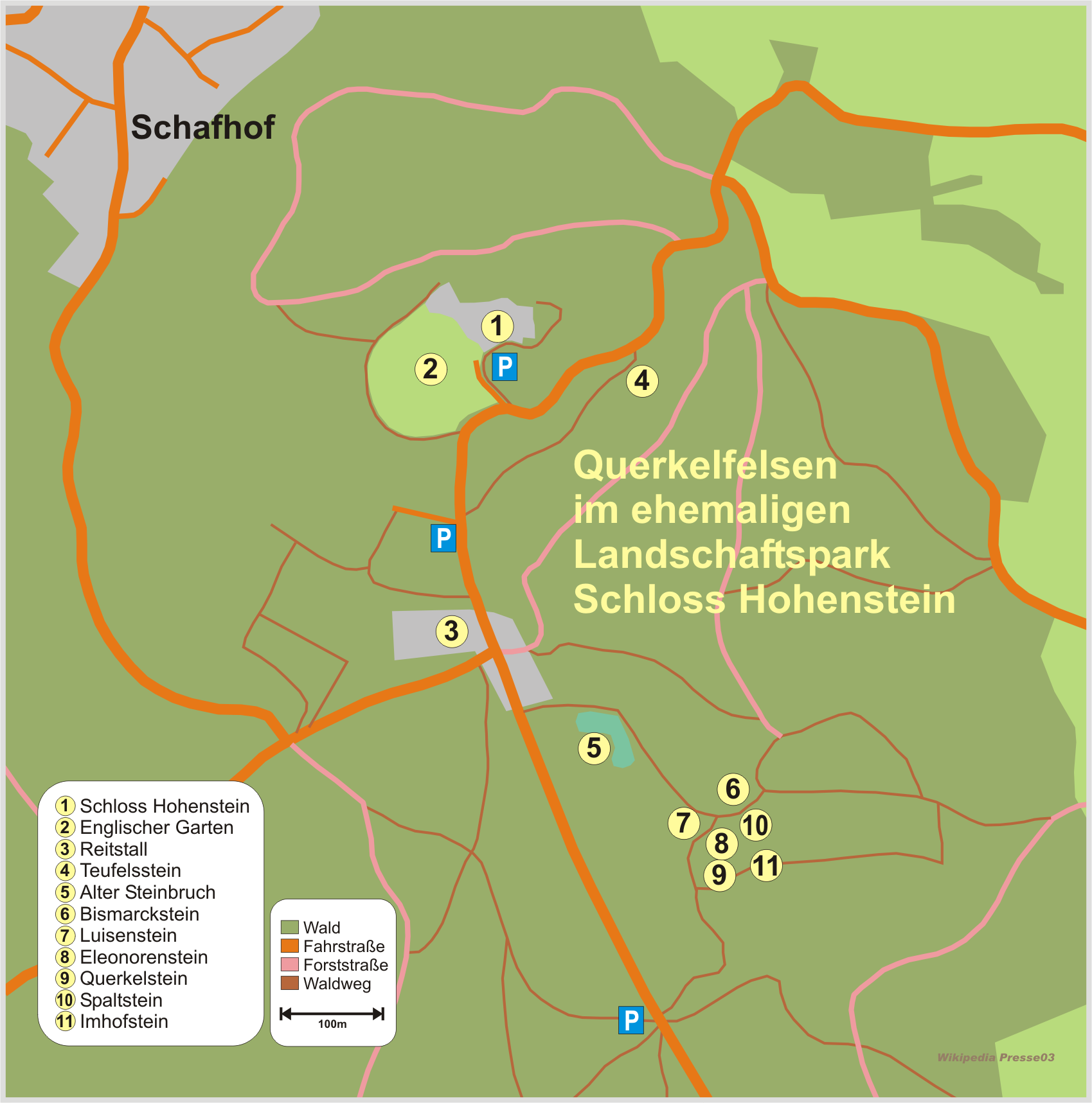 Karte der Lage der Querkelfelsen bei Schloss Hohenstein (Oberfranken) - Bayern - Deutschland